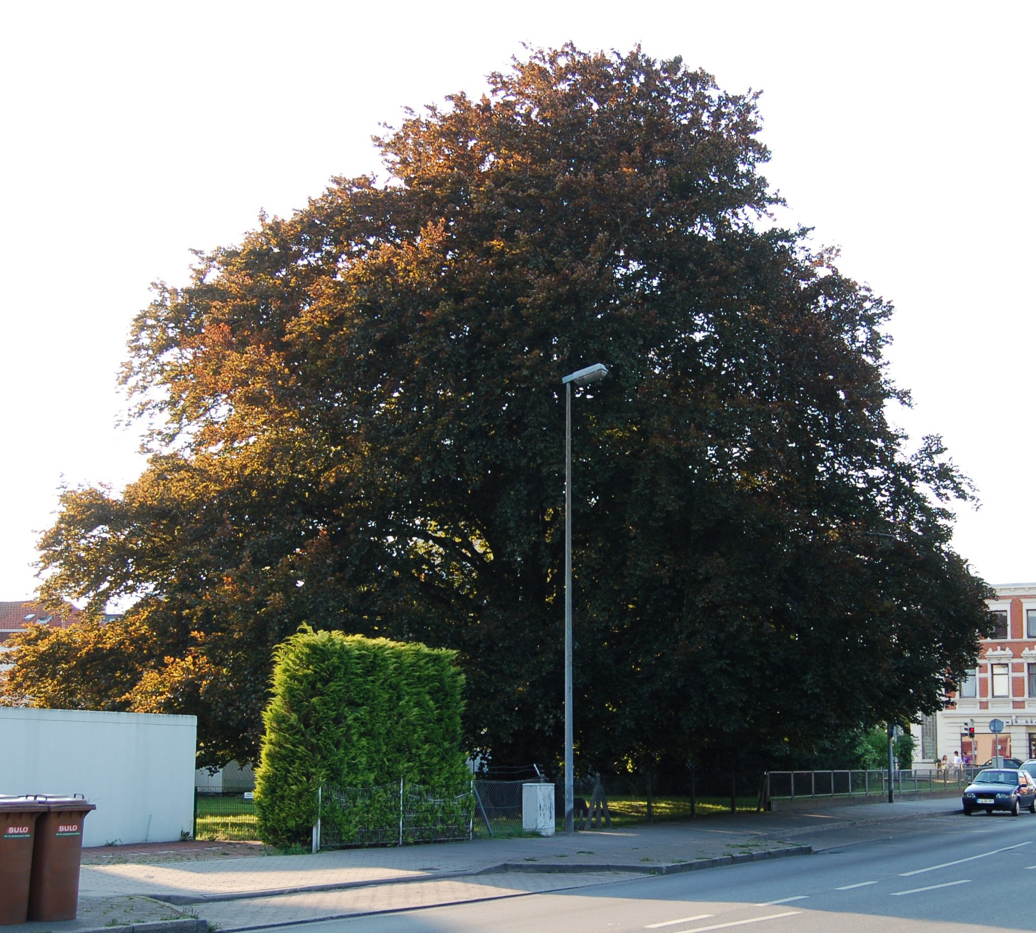 Purpurbuche (Fagus sylvatica f. purpurea); eine der ältesten Purpurbuchen in Schleswig-Holstein, diese Buche steht aufgrund ihrer Größe und Schönheit unter Naturschutz.